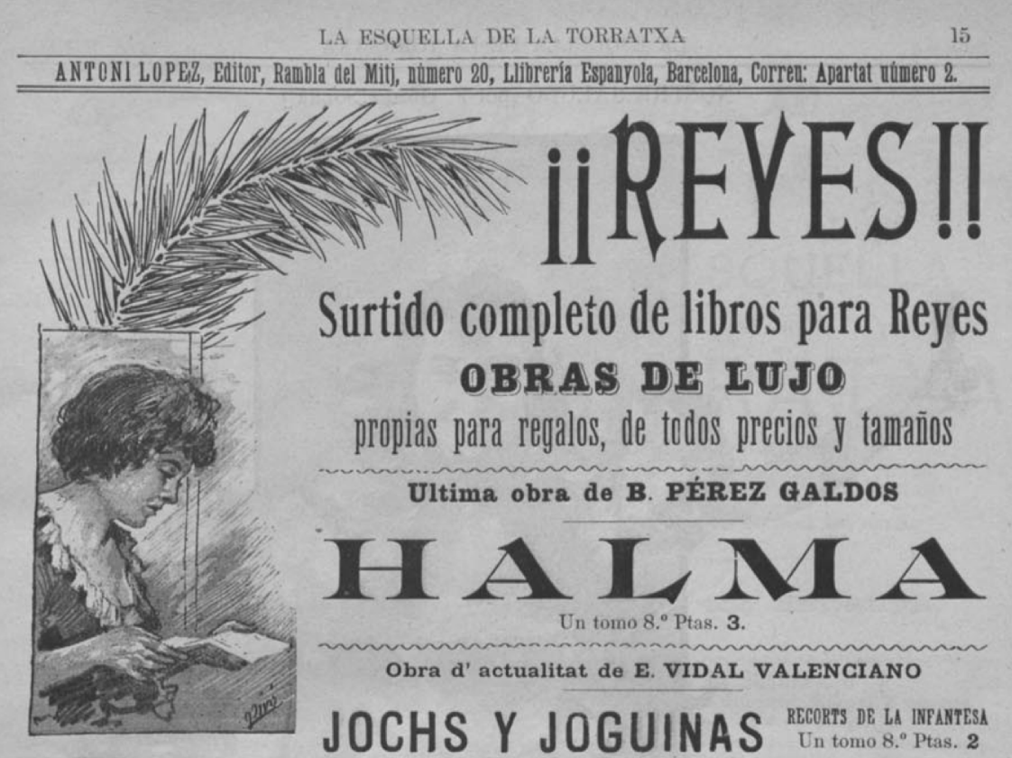 Detalle de una página de la revista La Esquella de la Torratxa